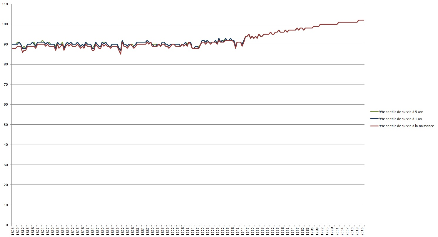 Dernier centile de survie à la naissance: âge à partir duquel 99% de la population est morte. - Dernier centile de survie à 1 an: âge à partir duquel 99% de la population de la population ayant survécu à leur 1er anniversaire est morte. - Dernier centile de survie à 5 ans: âge à partir duquel 99% de la population de la population ayant survécu à leur 5ème anniversaire est morte.